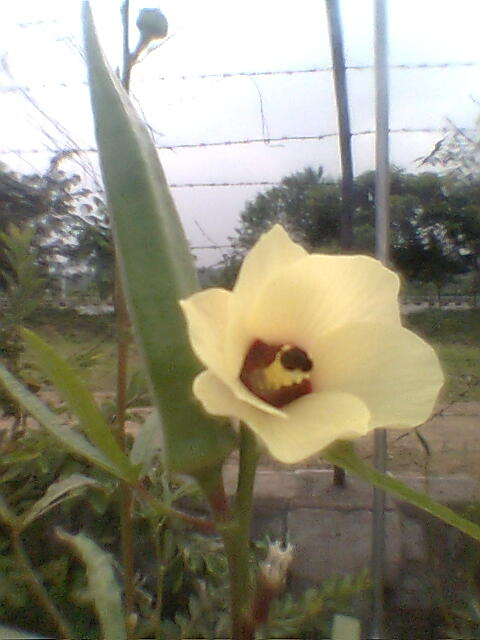 வெண்டைக்காயும் மலரும்